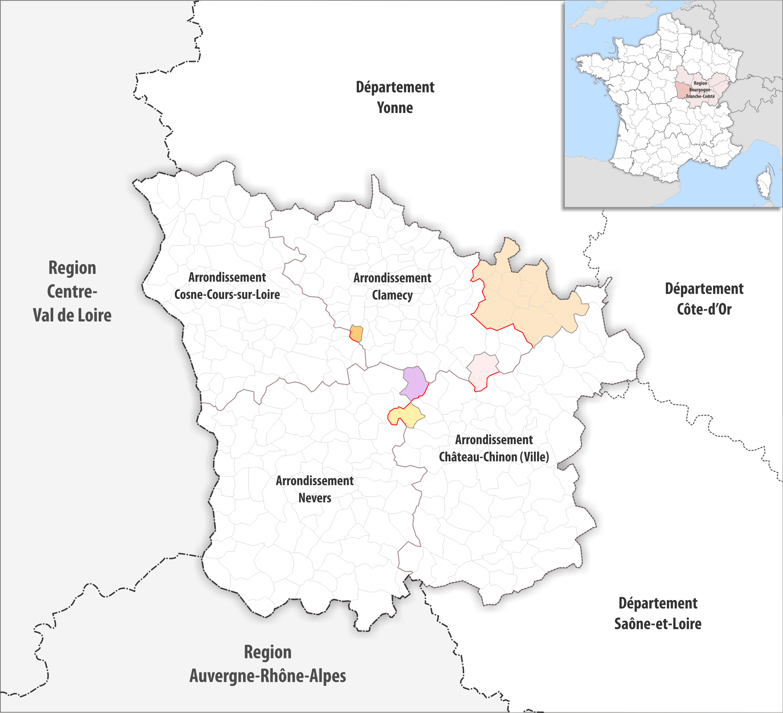 Arrondissements Anpassungen auf 2017 im Departement Nièvre